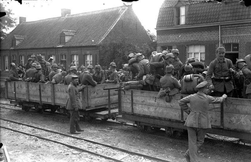 I. Weltkrieg 1914-1918 Truppentransport zur Front